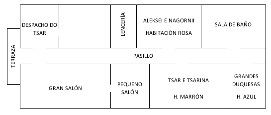 Plano esquemático da distribución das habitacións que ocupou a familia Romanov no primeiro piso da mansión do Gobernador en Tobolsk no ano 1918. Baseado nas descricións de Gilliard, Kobilinskii e as cartas da familia.